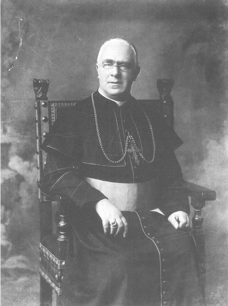 Ritratto del Cardinale Vittorio Amedeo Ranuzzi de' Bianchi